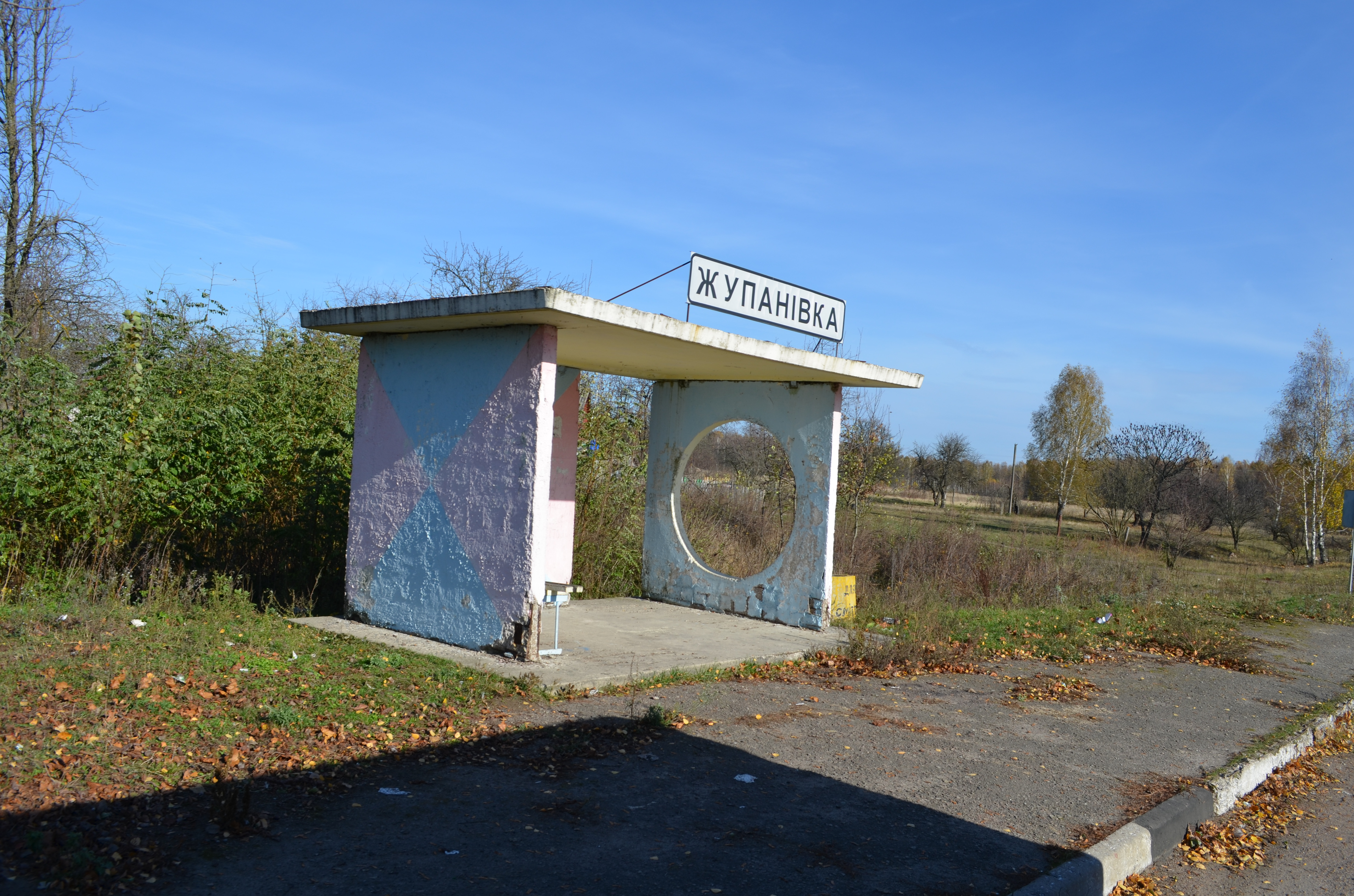 с. Жупанівка. Автобусна зупинка.